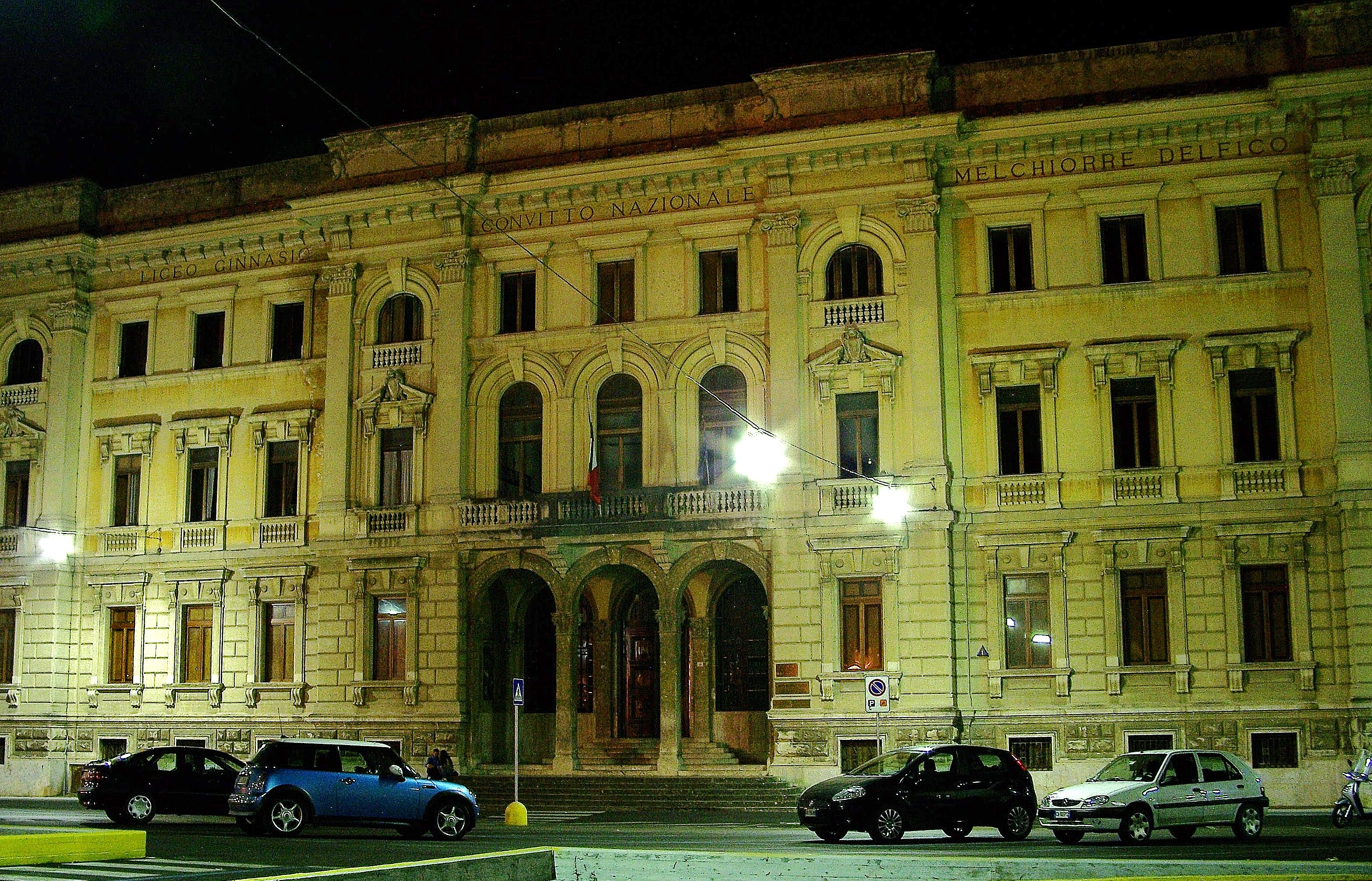 Teramo - Liceo Classico "M.Dèlfico" (1813)